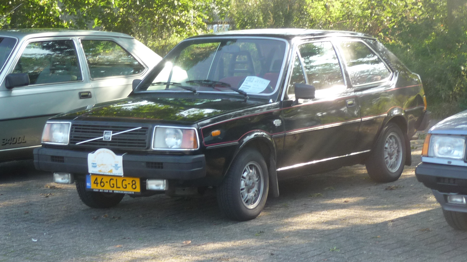 46-GLG-8 Volvo Klassieker Beurs 2008